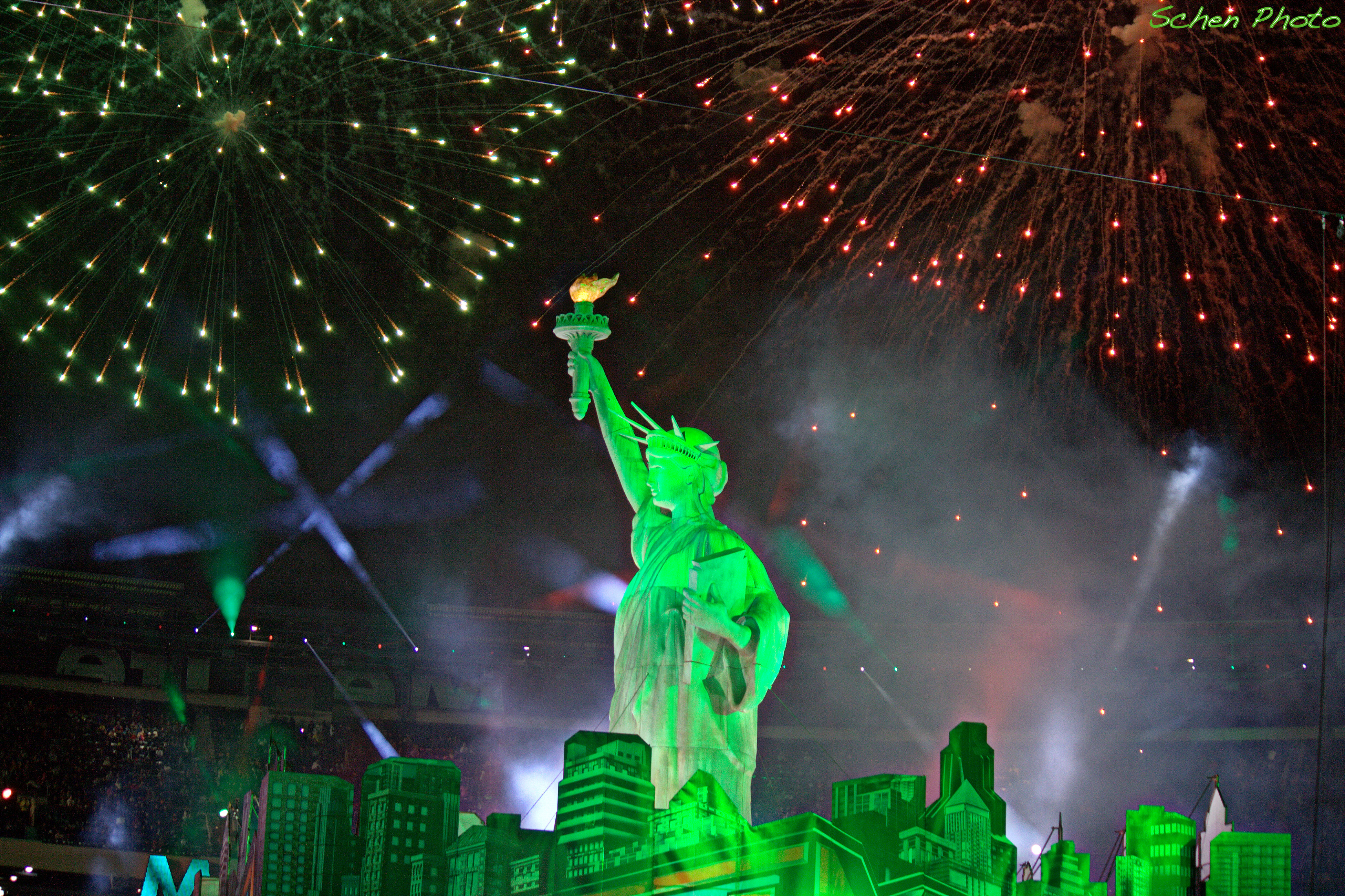 Del Rio Fireworks